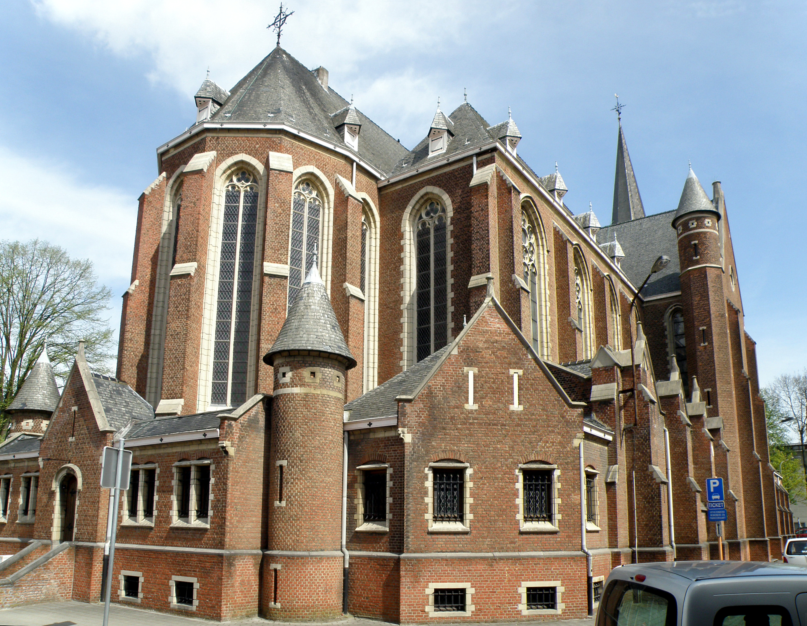 Mortsel bij Antwerpen. Heilig Kruiskerk, aan de Heilig-Kruisstraat.